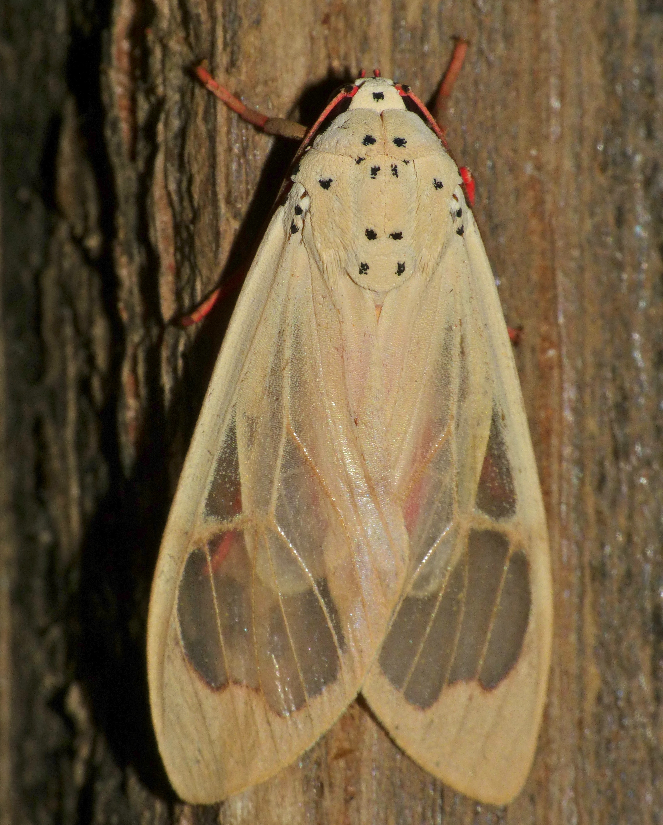 Mantuma Camp, uMkhuze Game Reserve, Kwazulu-Natal, SOUTH AFRICA